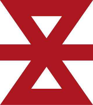 澁澤倉庫社章